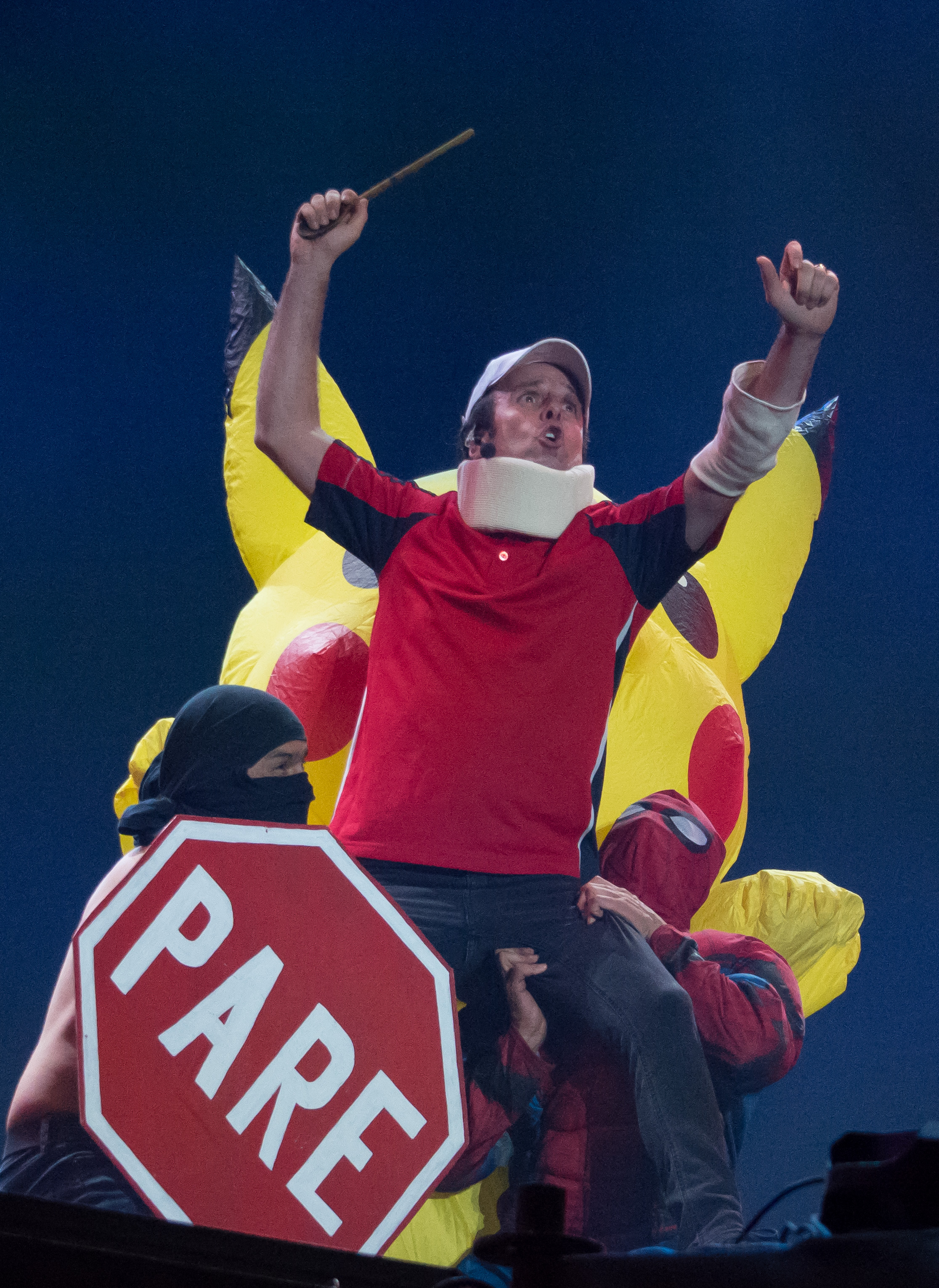 Expo Quillota 2020, Estadio Municipal Lucio Fariña Fernández, Quillota, Región de Valparaíso, Chile